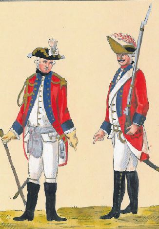 66. Regiment Grenadierów Konnych (Leib Grenadier Regiment)(oficer i szeregowy gwardii pieszej litewskiej